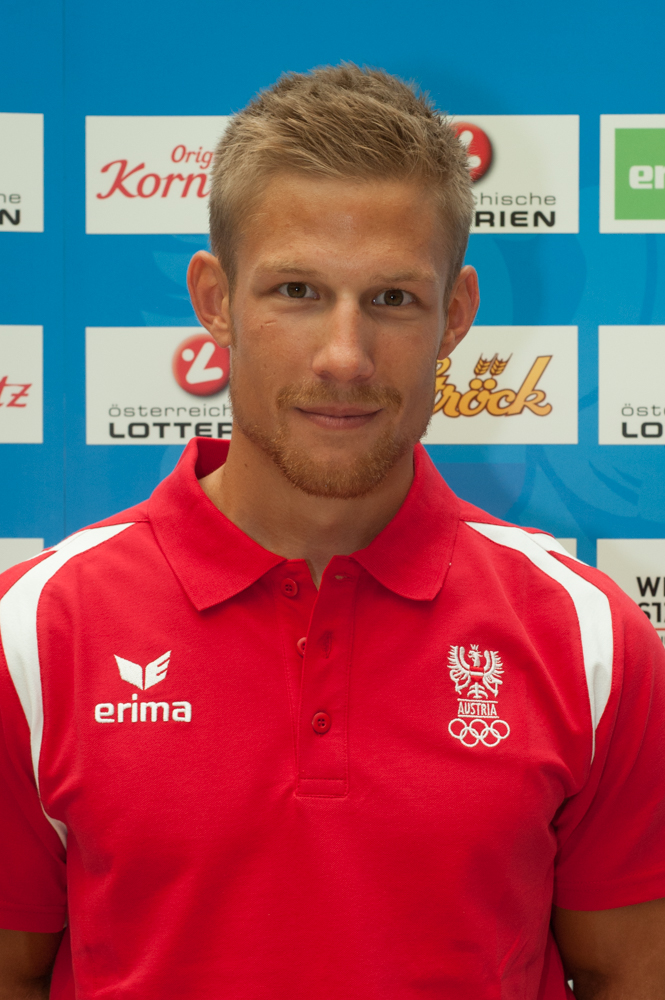 Einkleidung der Österreichischen Teilnehmer an den Olympischen Sommerspielen 2016 am 16./17. Juli 2016 in Wien. Bild zeigt Bernhard Sieber